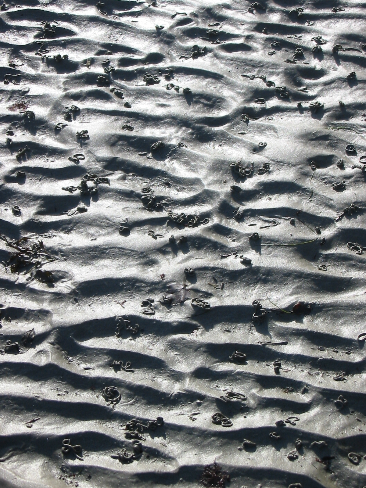 des louêmes du sablion dans la Baie d'la Ville